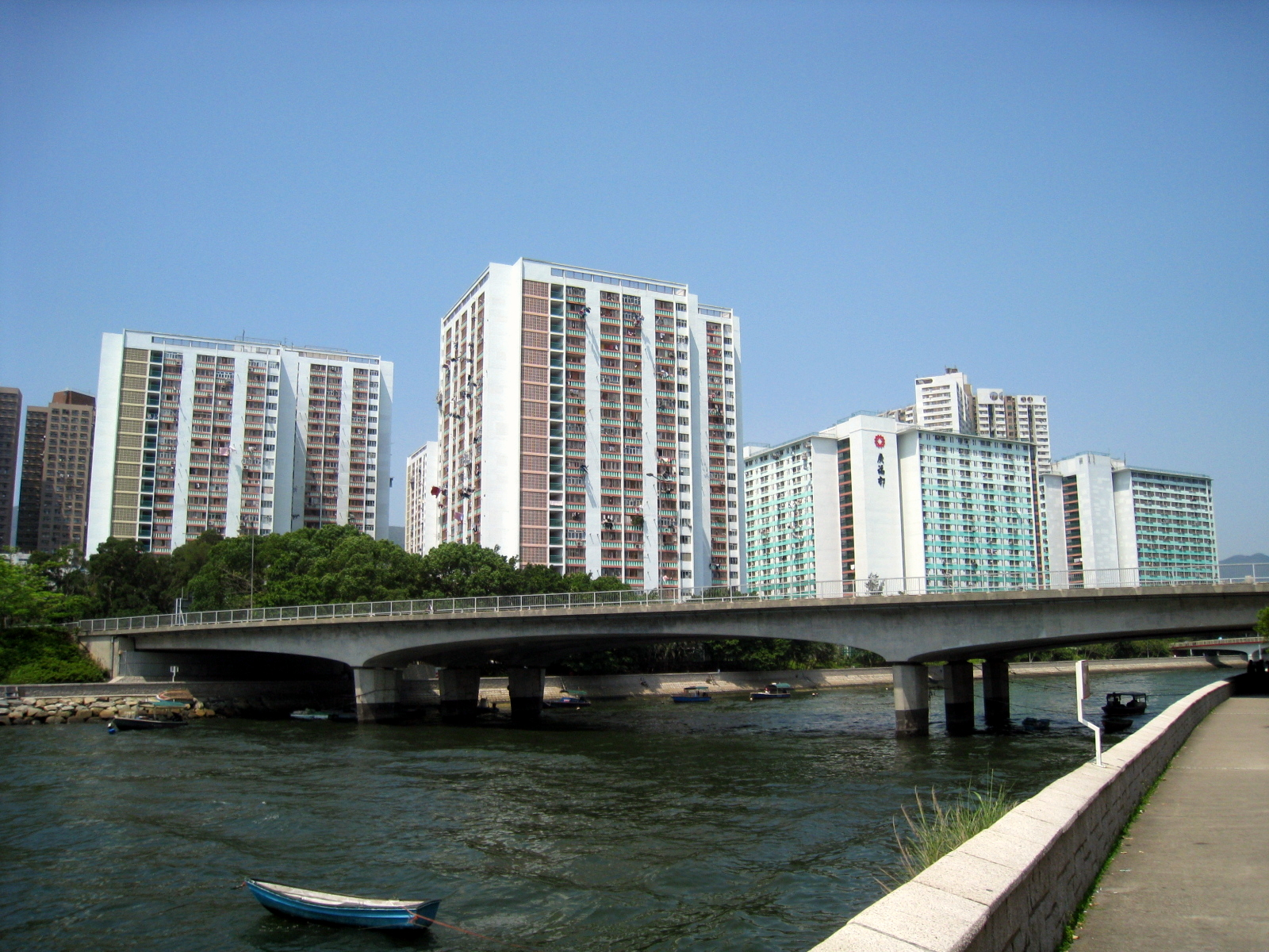 Kwong Fuk Estate 廣福邨